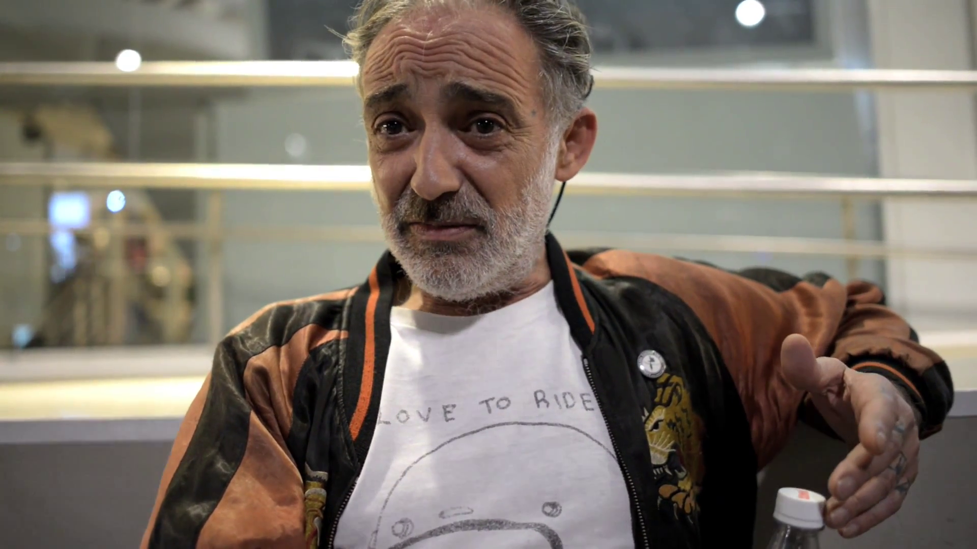 El fotógrafo español Alberto García Alix conversa con sobre fotografía. El diálogo se produjo en São Paulo, Brasil en octubre de 2013. FD13_ec vsfotonet